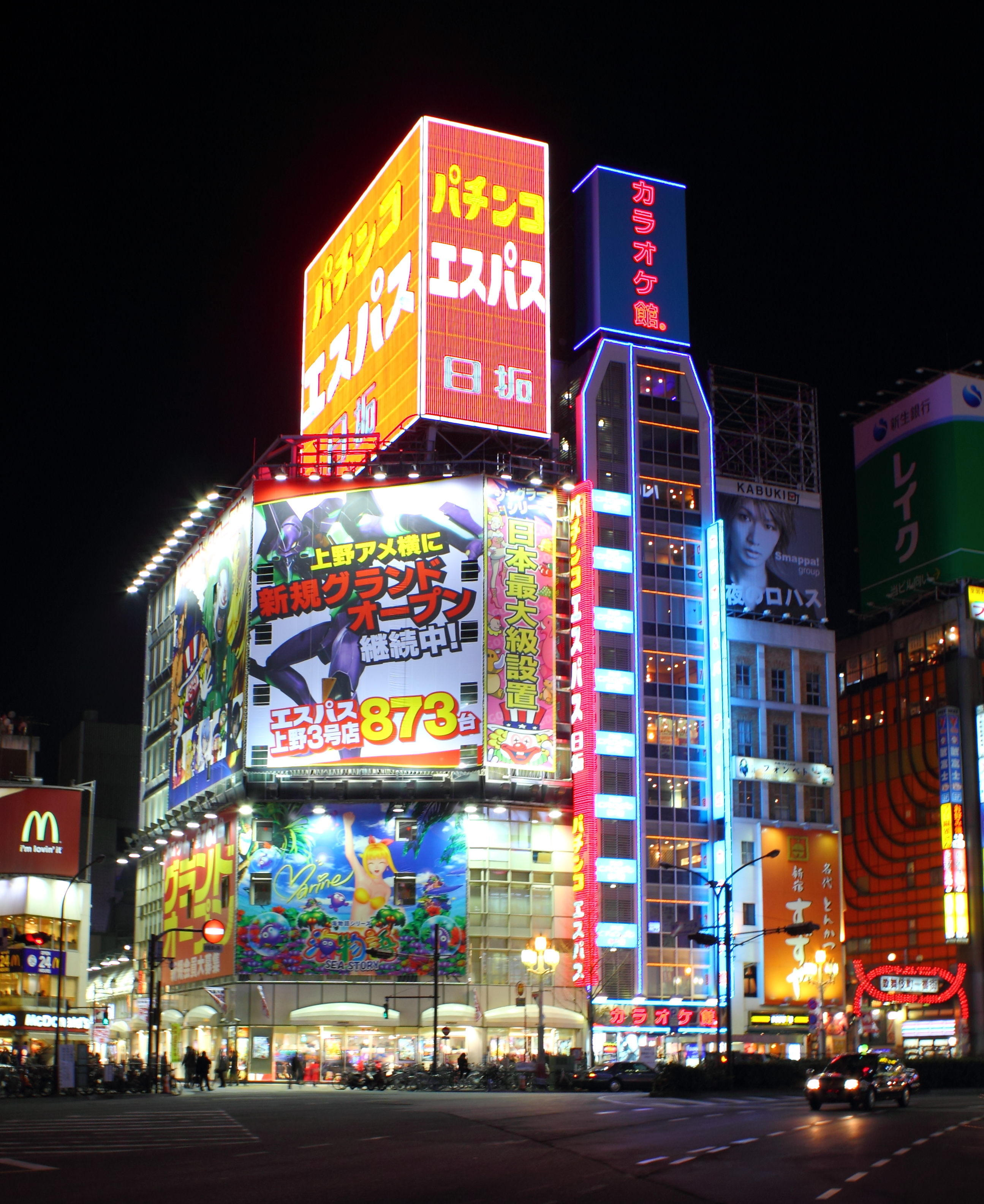 エスパス新宿店